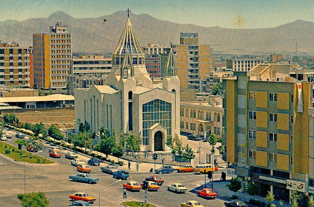 Saint Sarkis Church - Tehran - 1973 خیابان کریمخان زند - کلیسای سرکیس مقدس - 1352